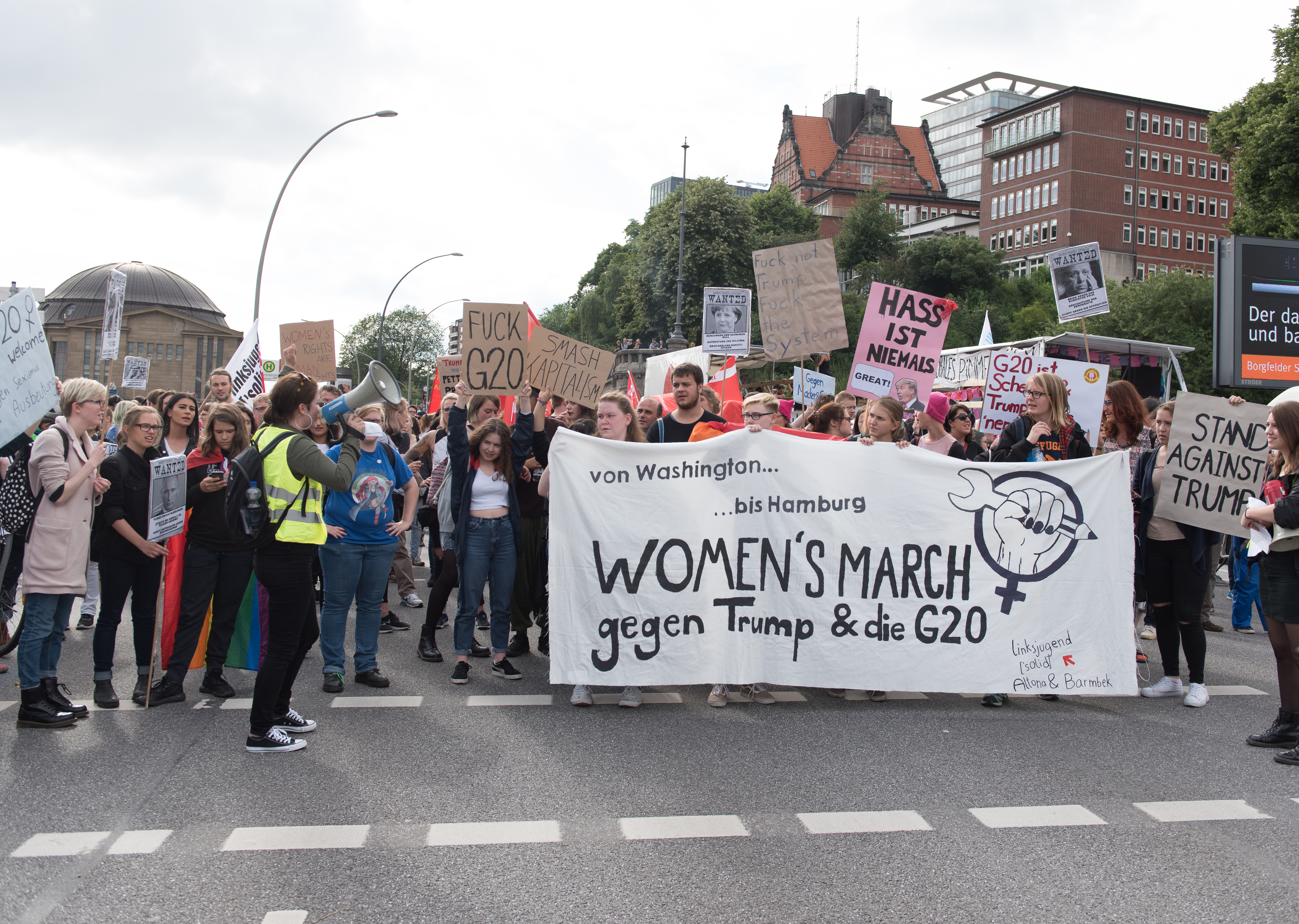 Woman's March gegen Trump und die G-20 beim Alten Elbtunnel in Hamburg